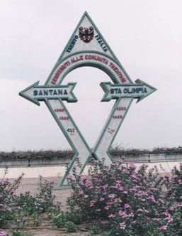 Imagem de Santa OLímpia e Santana